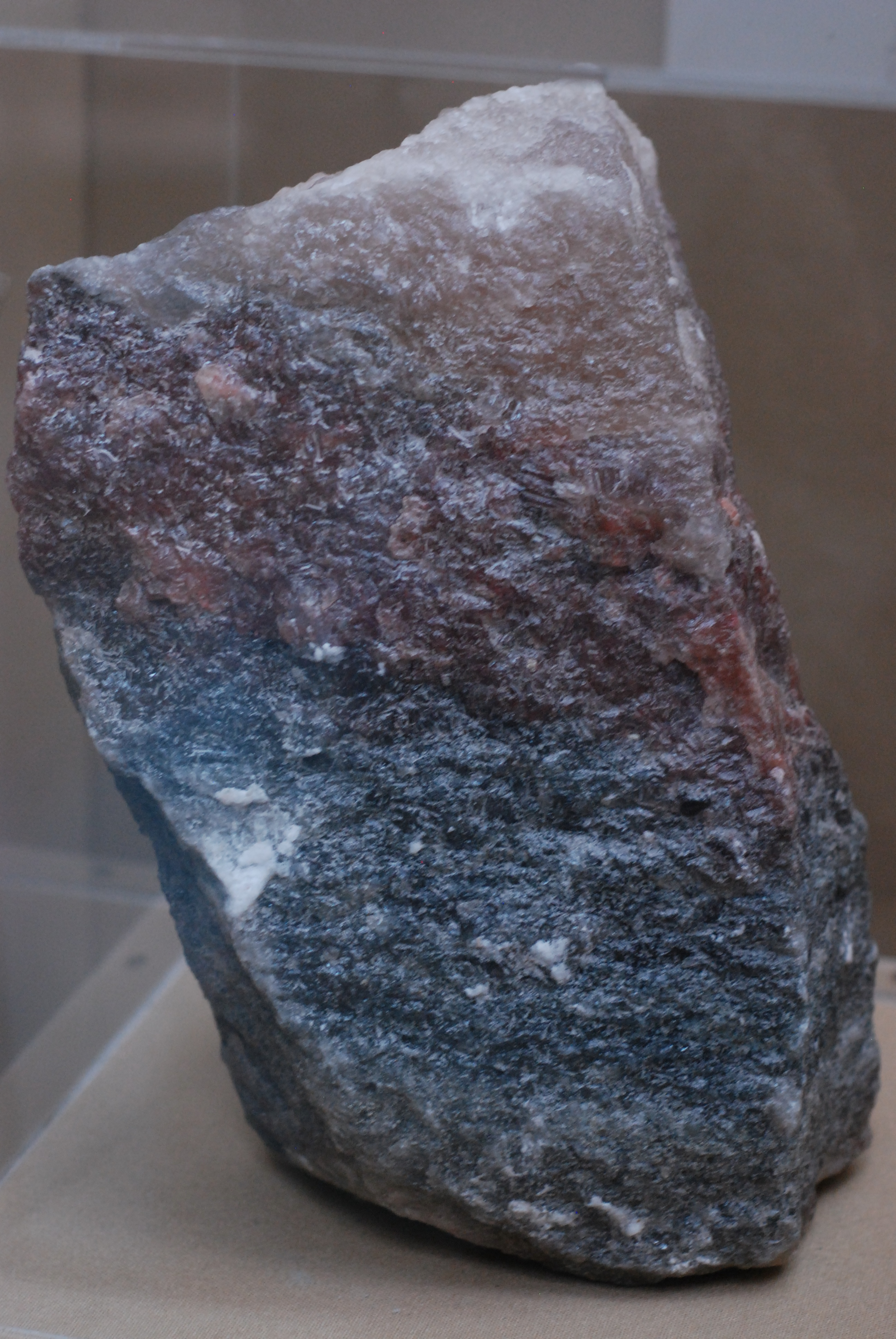 Silvita (Sal de potasio). Se utiliza para la elaboración de fertilizantes Chos Malal, Neuquén, Argentina.